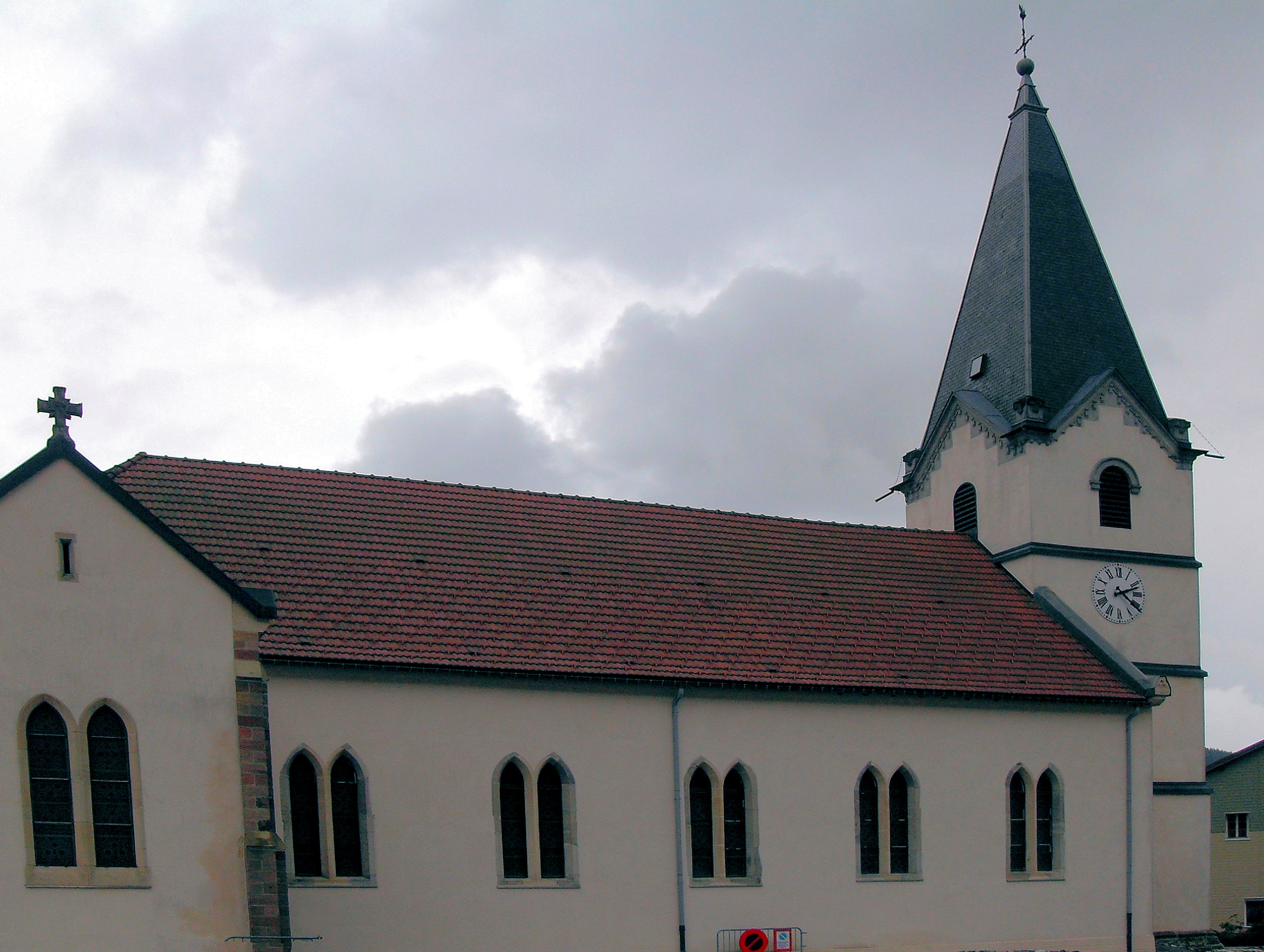 L'église Saint-Blaise á Ménil, côté ouest